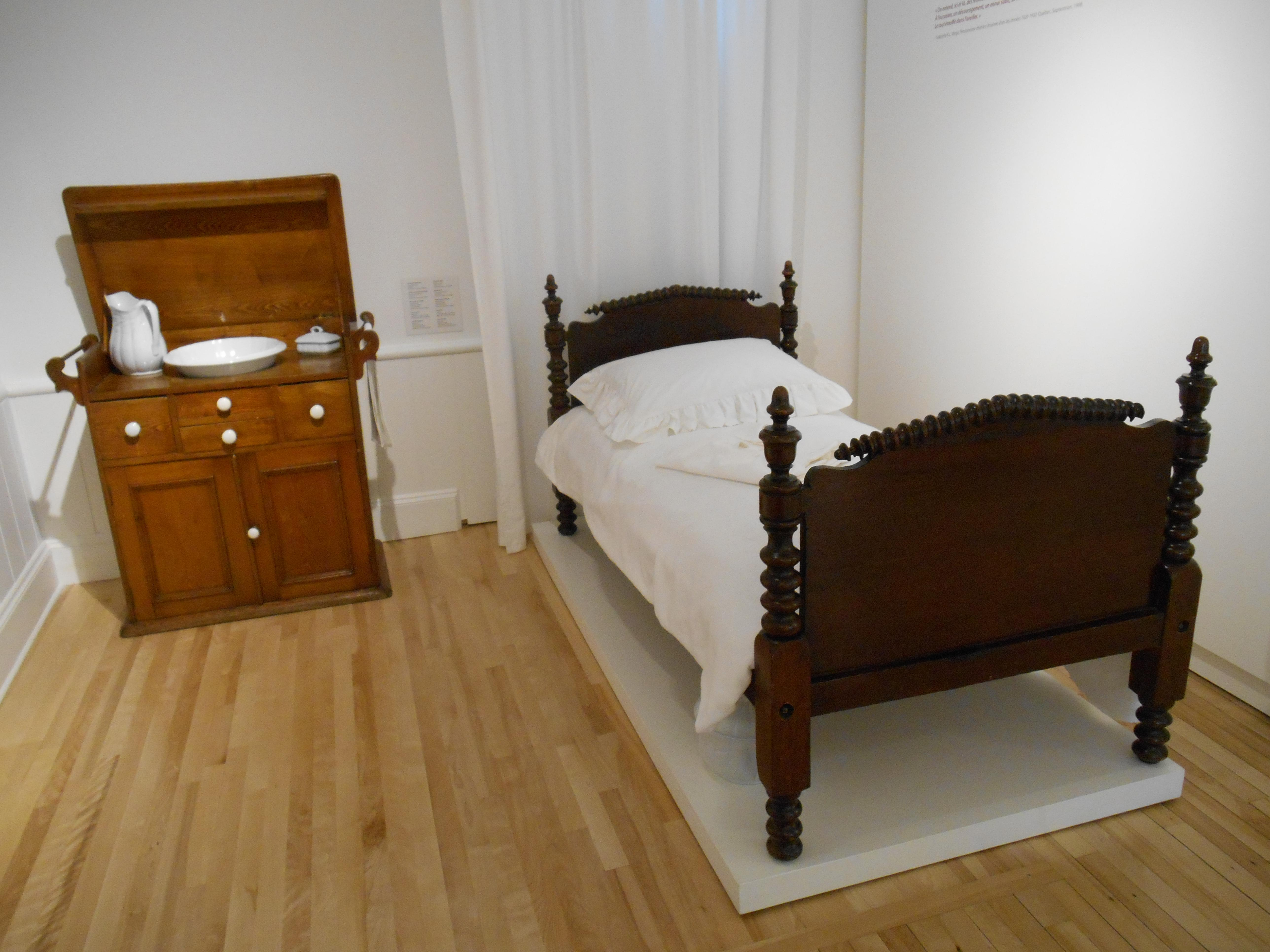 Musée des Ursulines de Québec Lit de pensionnaire, chêne, pin, acier, 19e siècle Table-commode de toilette, bois, métal, céramique, 19e siècle Pot a eau et cuvette, Baker & Co. Ltd, porcelaine anglaise, fin du 19e siècle Porte-savon, céramique, deuxième moitié du 19e siècle Pot de chambre, Baker & Co. Ltd, porcelaine anglaise, 19e siècle (1839-1893)